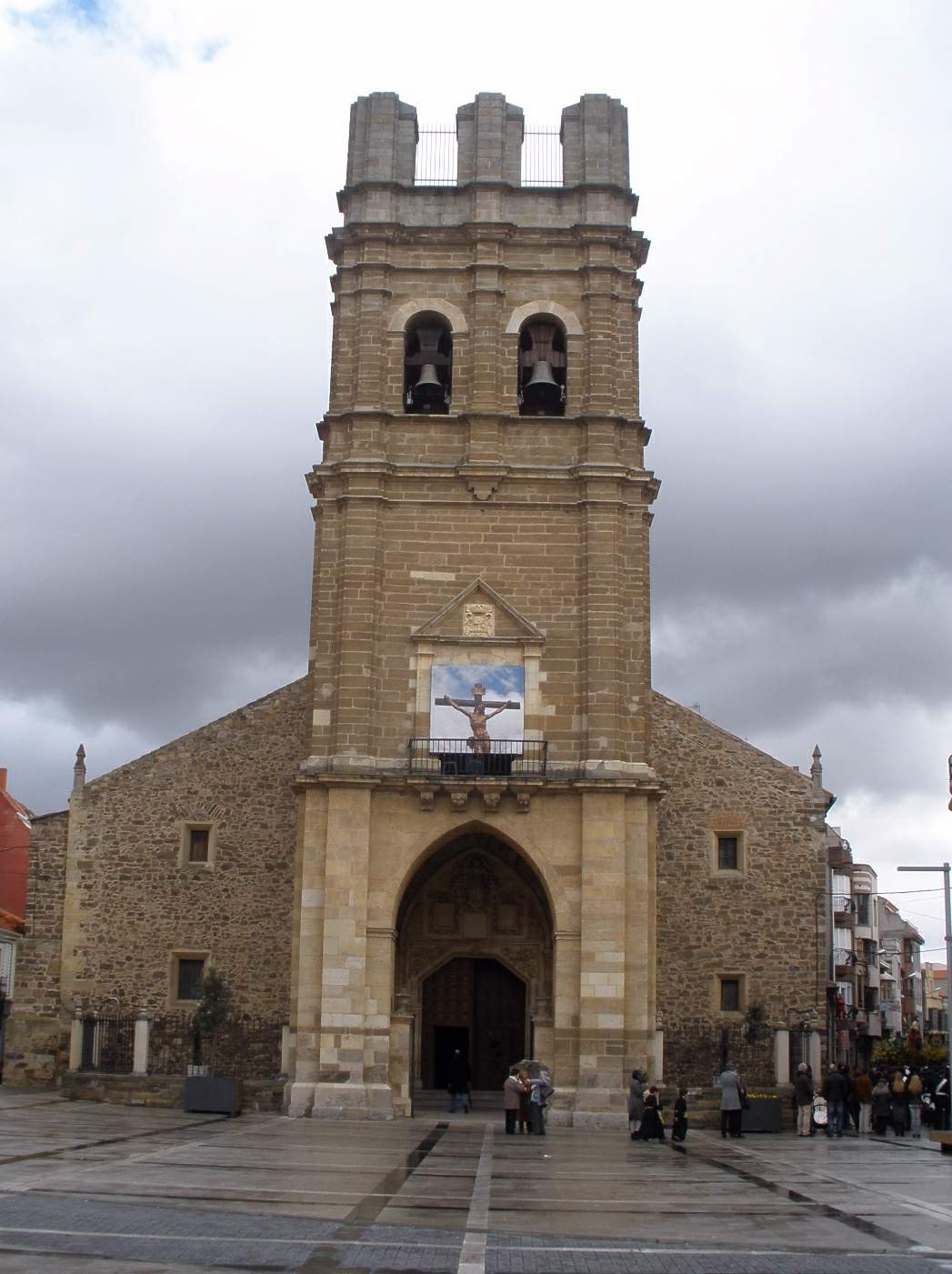 Iglesia de Santa María (La Bañeza)